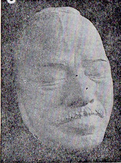 内村鑑三のデスマスク